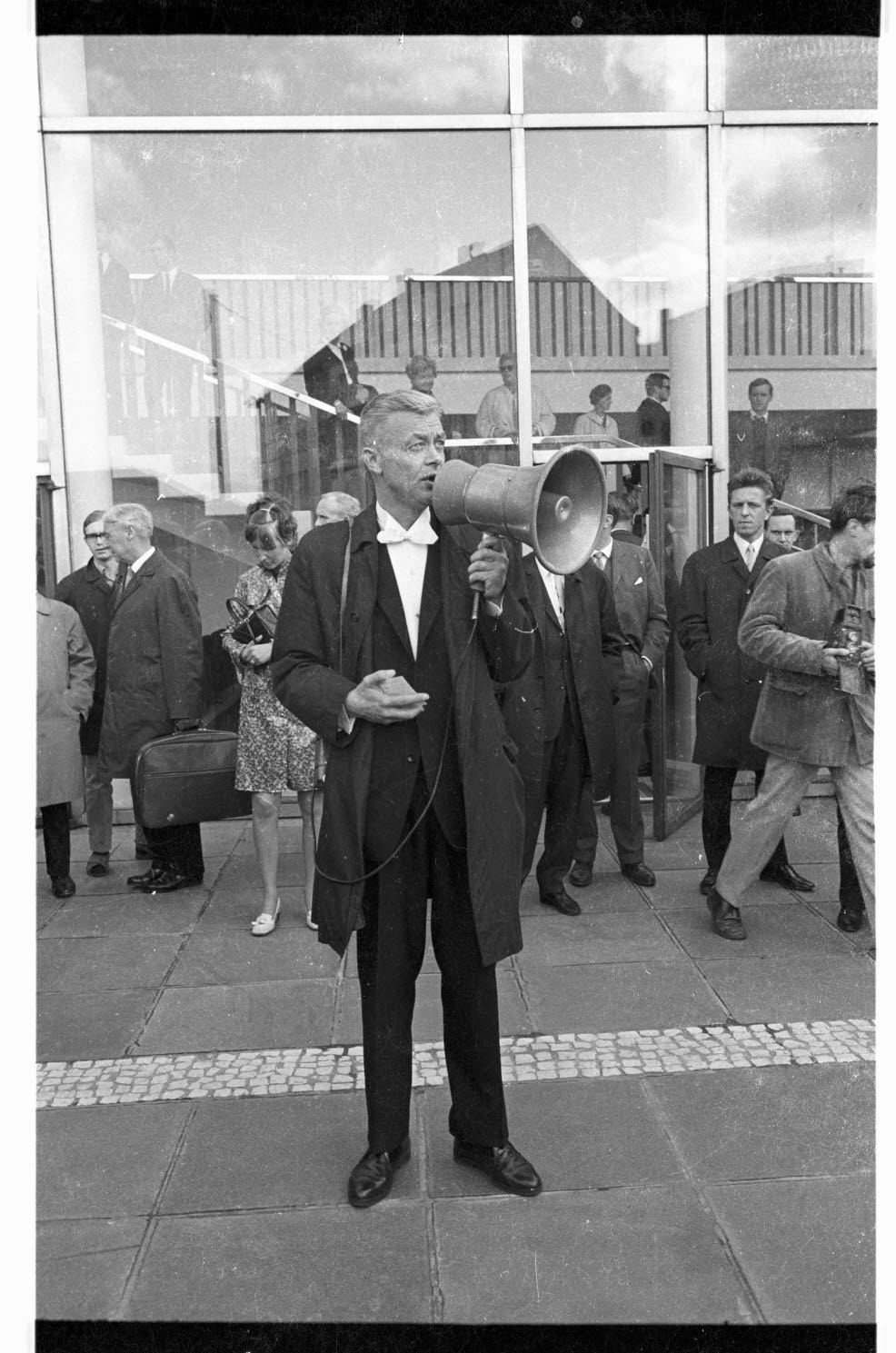 Der neue Rektor der Christian-Albrechts-Universität (CAU) Prof. Dr. Horst Braunert sagt vor der Konzerthalle am Schloss die Feier per Handlautsprecher ab.